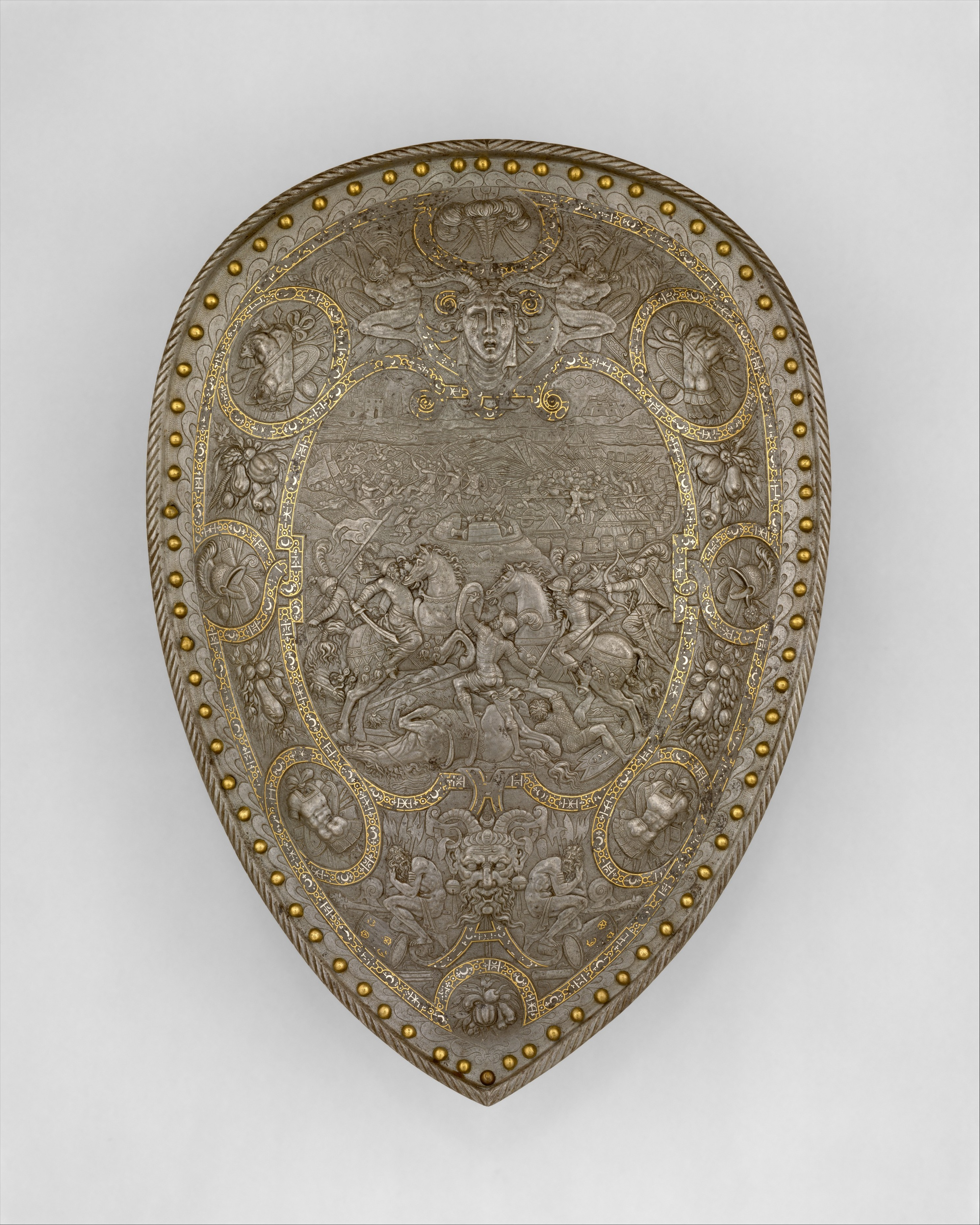 French; Shield; Shields